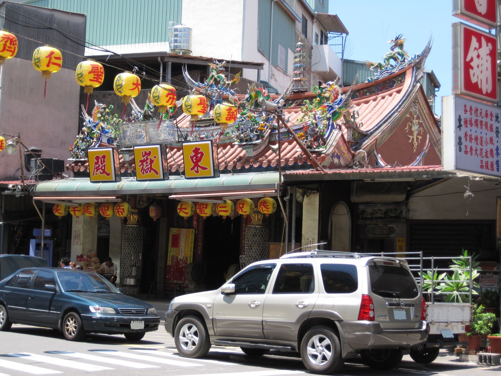 臺南東嶽殿